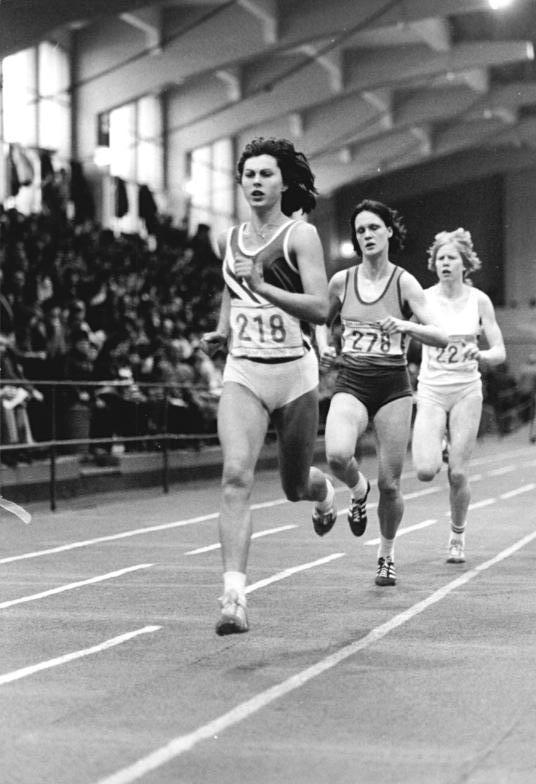 Hildegard Ullrich ADN-ZB Reiche 15.2.81 Senftenberg: Leichtathletik-Wettkämpfe- Über 800 m der Frauen gab es durch Hildegard Ullrich (Nr. 218) vom Turbine Erfurt - hier beim Vorlauf - in ansprechenden 2:01,0 Min. einen Favoritensieg. Die zweitägigen Titelkämpfe wurden in 24 Disziplinen (Männer 14, Frauen 10) ausgeführt.